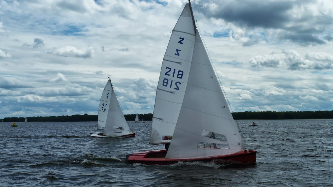 Müggelseepreis